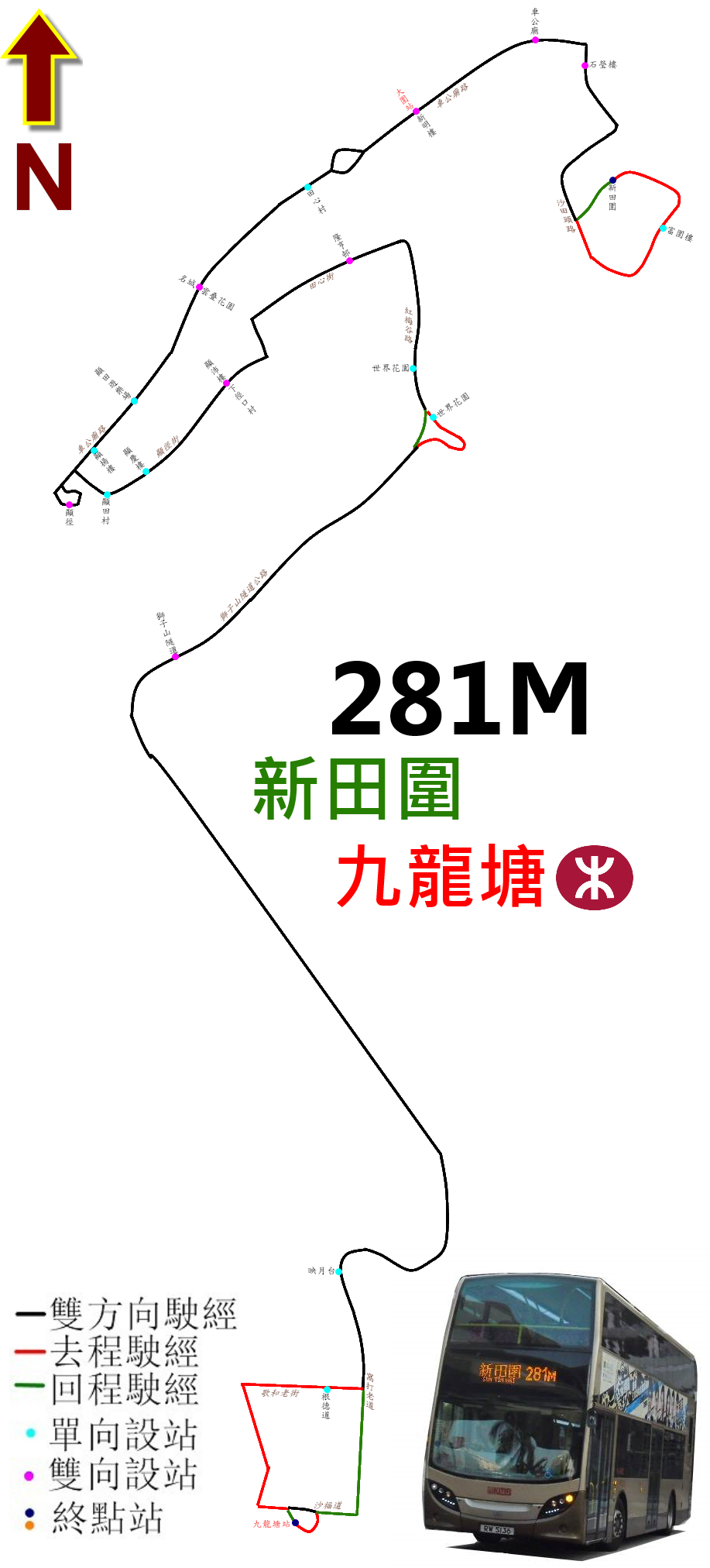 中文（香港）: 九巴281M線的走線圖